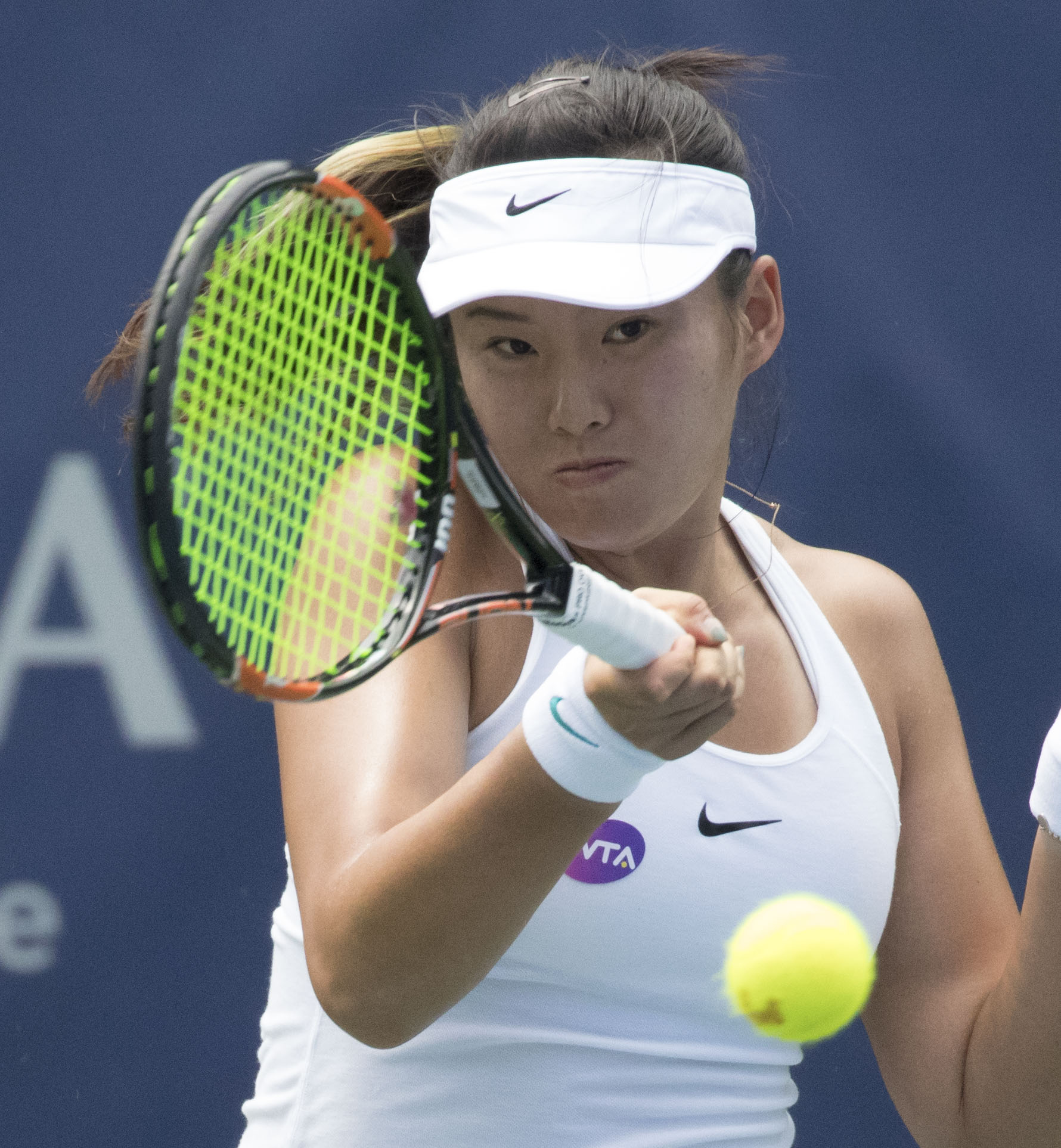 2016 Citi Open